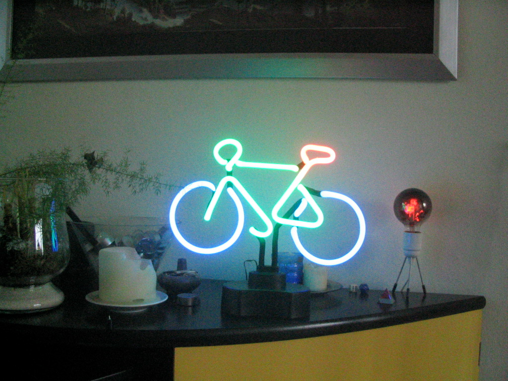 Door de auteur zelf gemaakte foto.